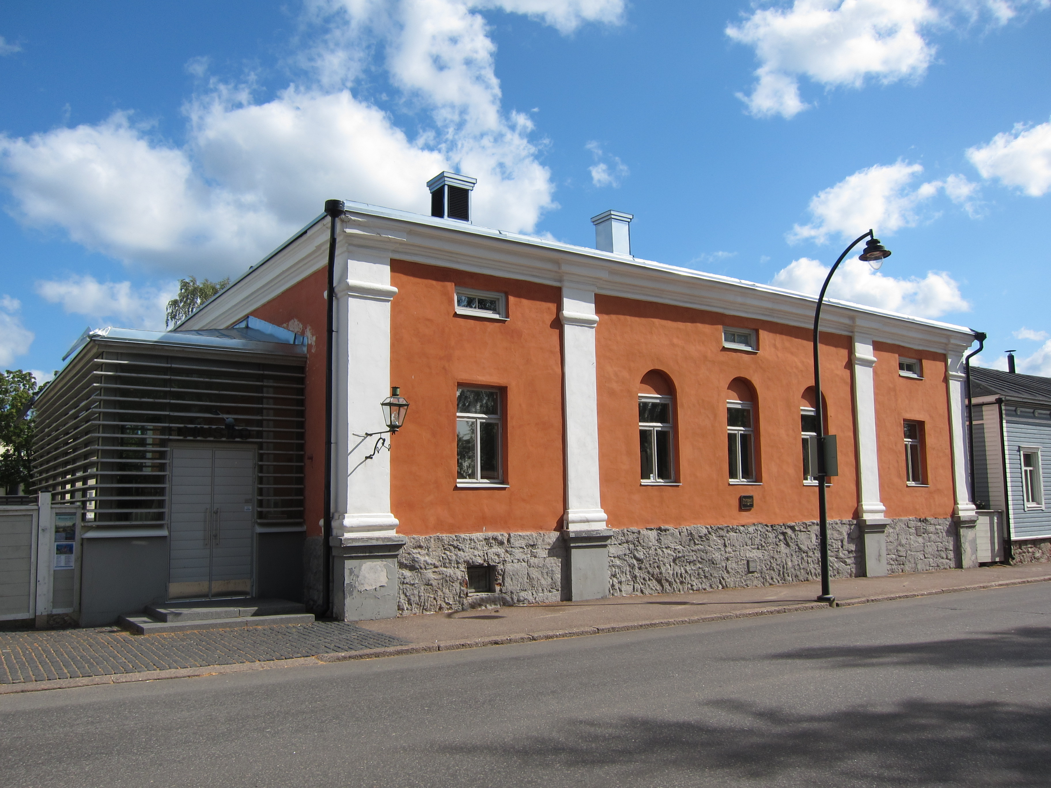 Haminan kaupunginmuseon rakennus noin vuodelta 1760.